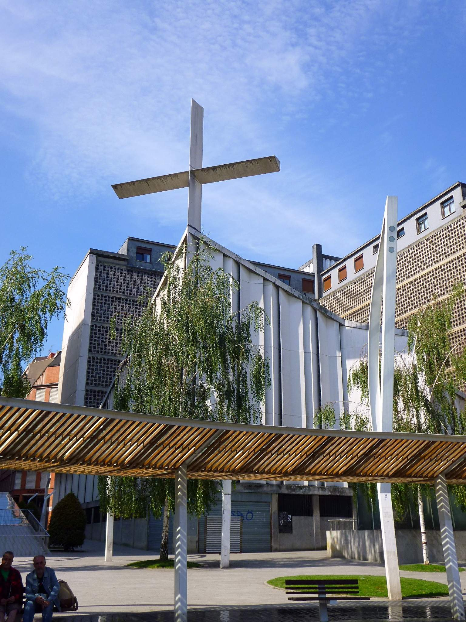 Iglesia de Nuestra Señora del Carmen (Bilbao)